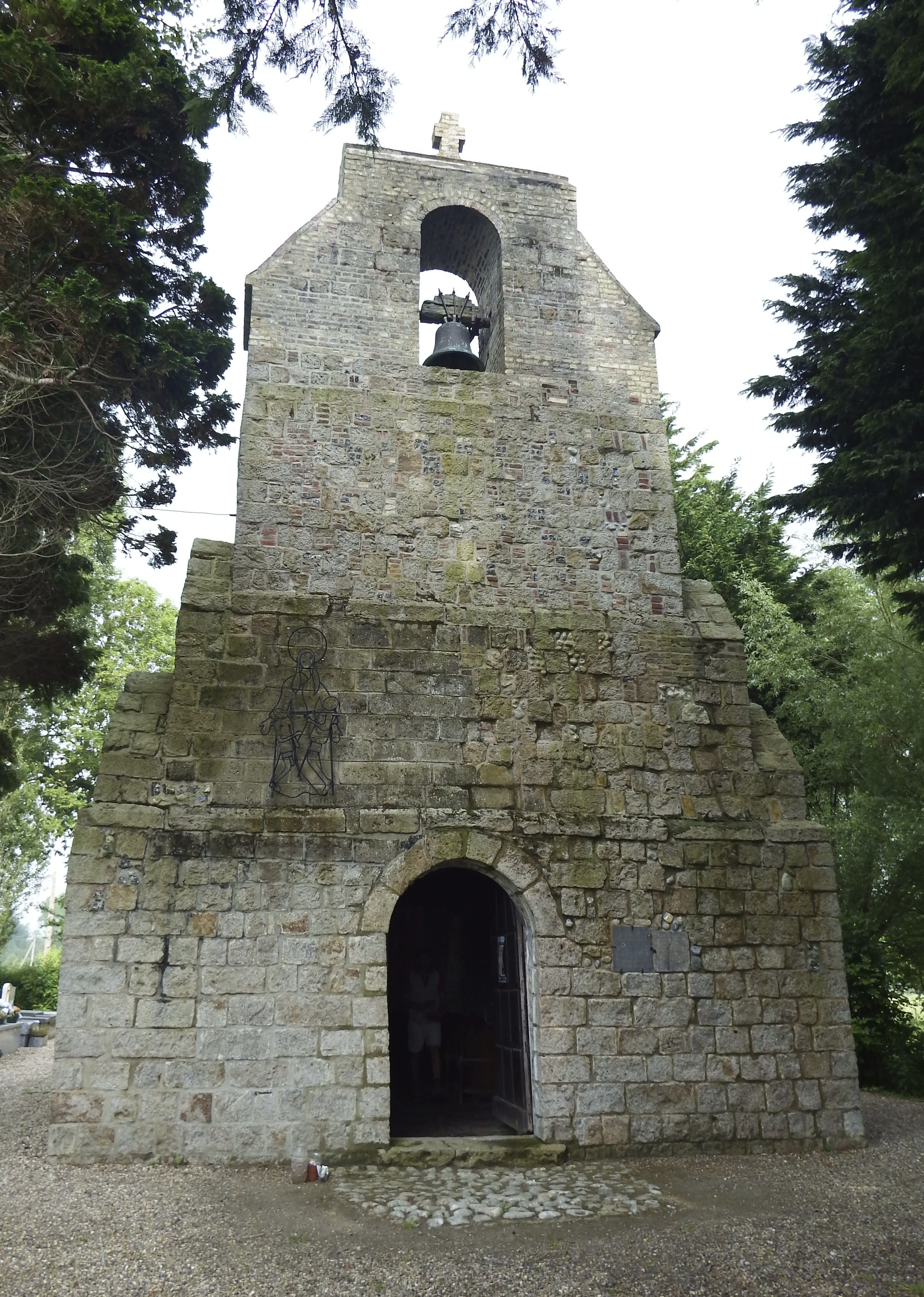 La chapelle dédiée à Saint-Corneille dispose d'une cloche de 1541 classée. La nef est en forme de coque de bateau renversée.